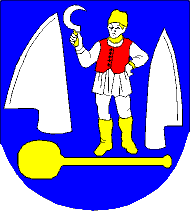 Das Wappen der Stadt und Gemeinde Backi Petrovac